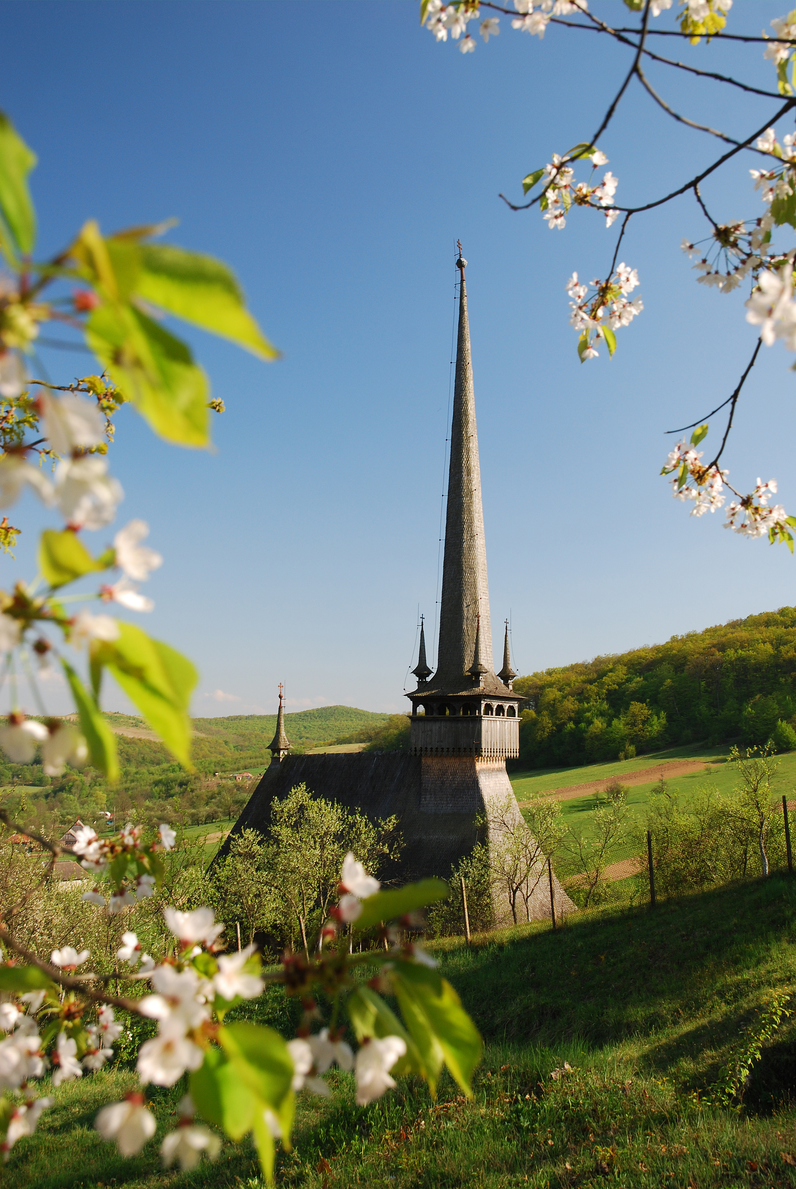 Biserica de lamn din Fildu de Sus, Salaj